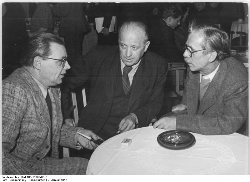 Berlin, Volkskammersitzung, Nagel, Kneschke, Schwarz Zentralbild Quasch. 9.1.1952 Volkskammersitzung am 9.1.1952 Auf der Volkskammersitzung am 9.1.52 gaben Ministerpräsident Grotewohl und der Stellvertreter des Ministerpräsidenten Nuschke und Dr. Bolz wichtige Erklärungen über die Aufgaben des deutschen Volkes im Kampf um Einheit und Frieden ab. UBz: von links nach rechts: Professor Schwarz, Jena, Bundessekretär Karl Kneschke vom Kulturbund und Professor [Otto] Nagel, während der Sitzungpause. Abgebildete Personen: Nagel, Otto Prof.: Maler, Präsident der Akademie der Künste (AdK), Nationalpreisträger, Vaterländischer Verdienstorden (VVO) in Gold, DDR (GND 118586300) Kneschke, Karl: Sekretär des Kulturbundes, DDR